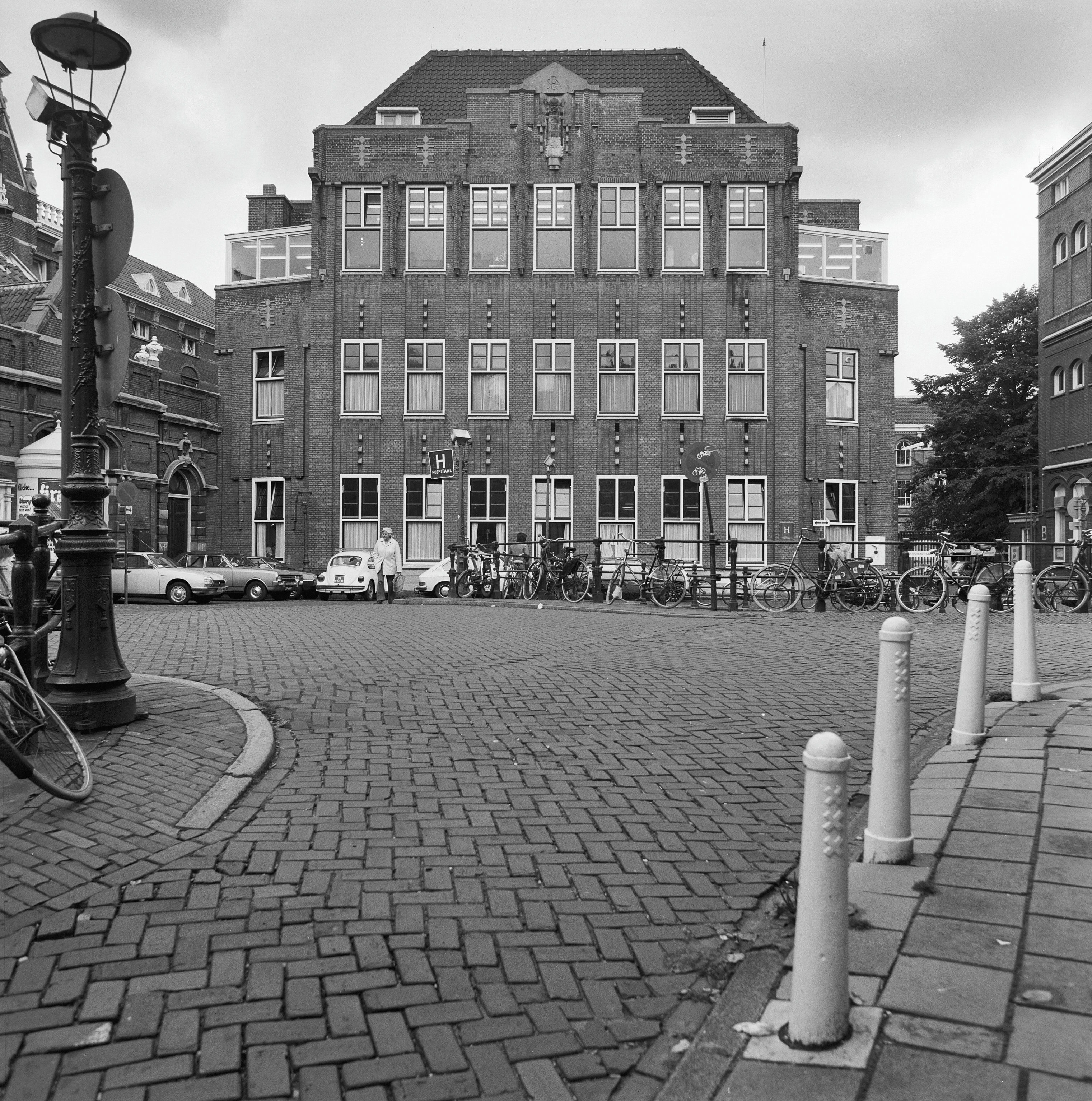 Binnengasthuis: administratiegebouw zuigelingenafdeling westgevel